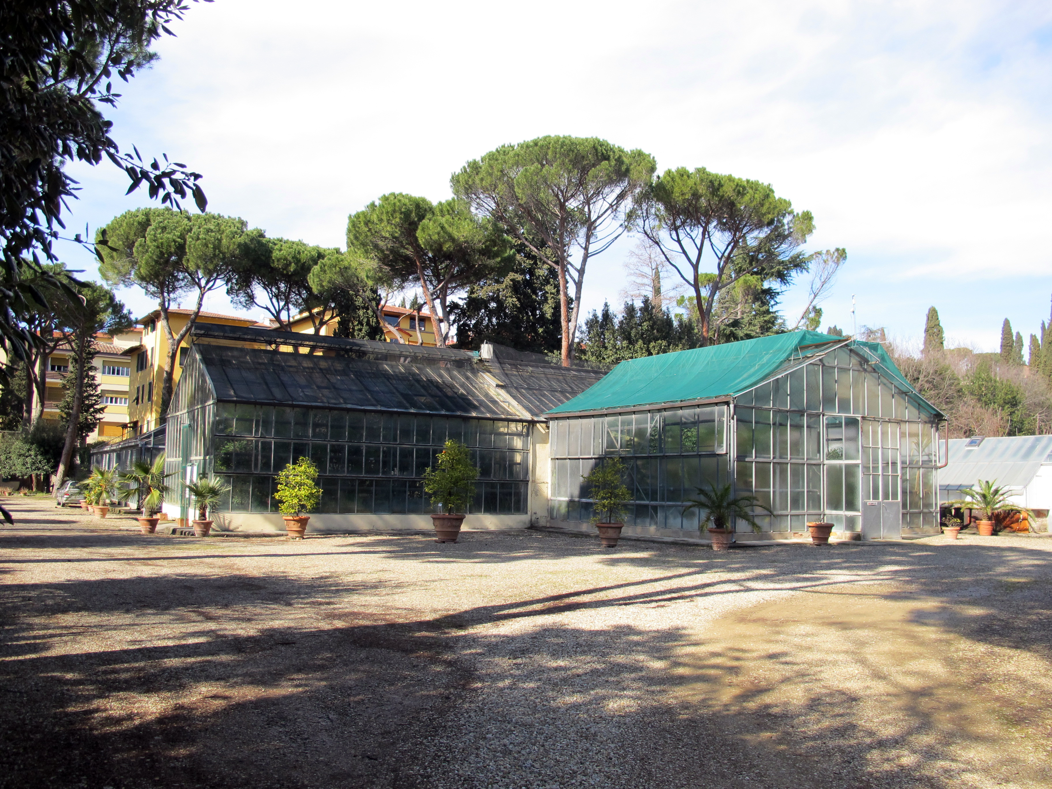 Istituto agronomico per l'oltremare, serre